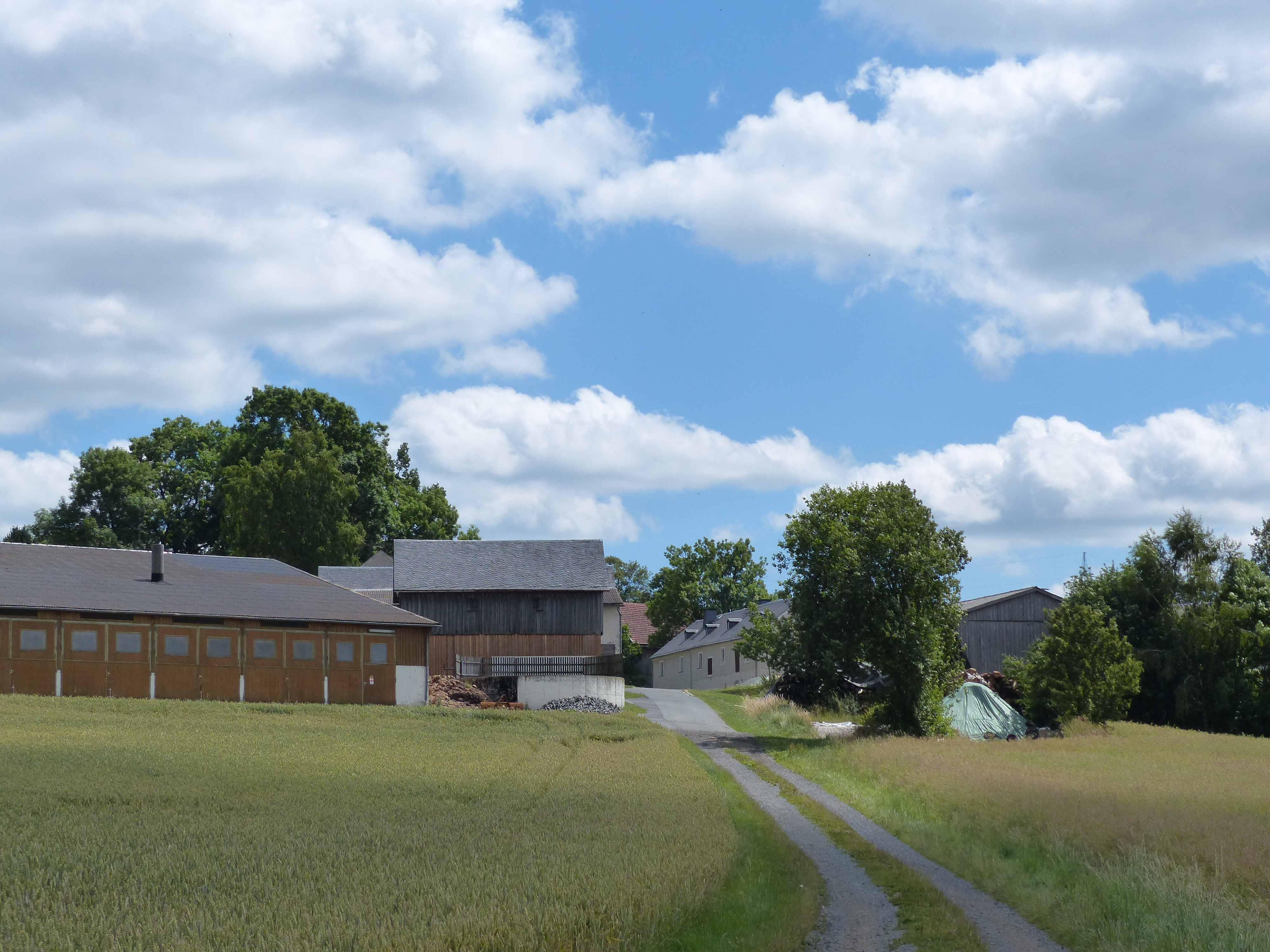 Schwingen, Ortsteil der stadt Schwarzenbach an der Saale